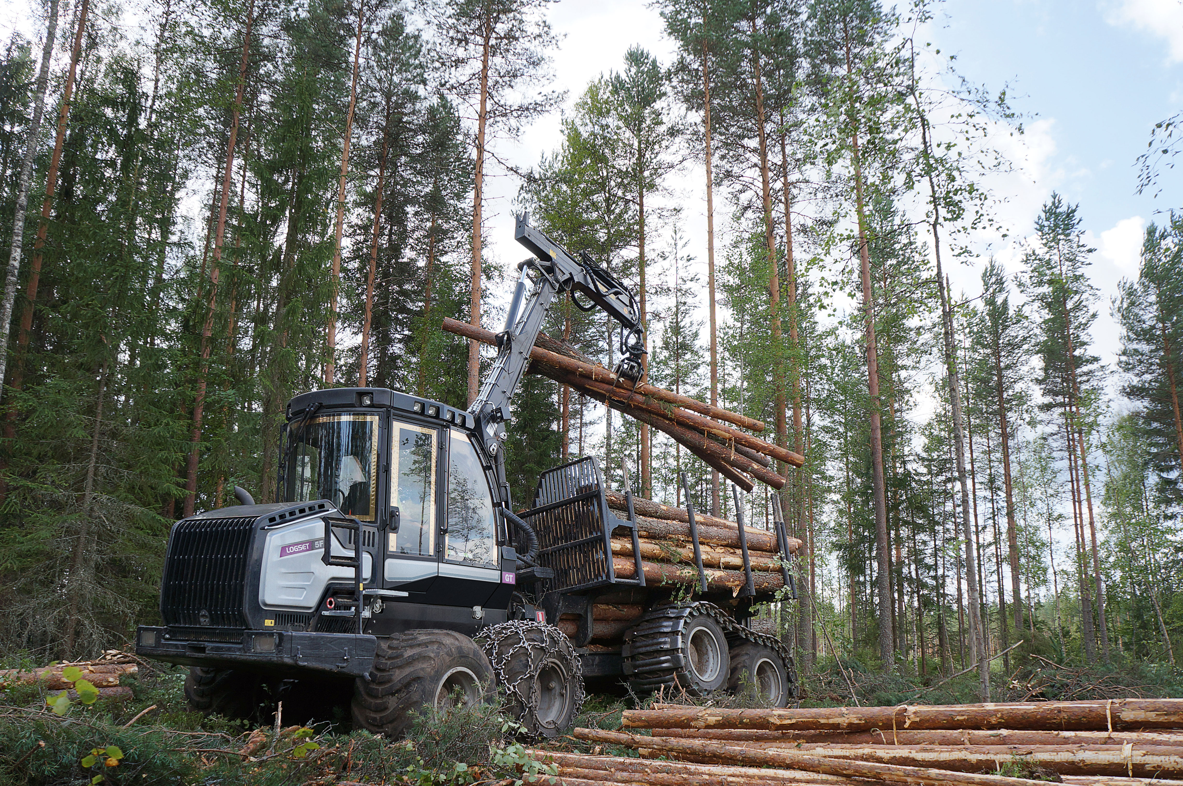 Logset 5F GT kuormatraktori